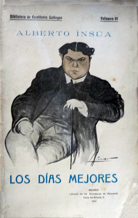 Portada de Los días mejores.